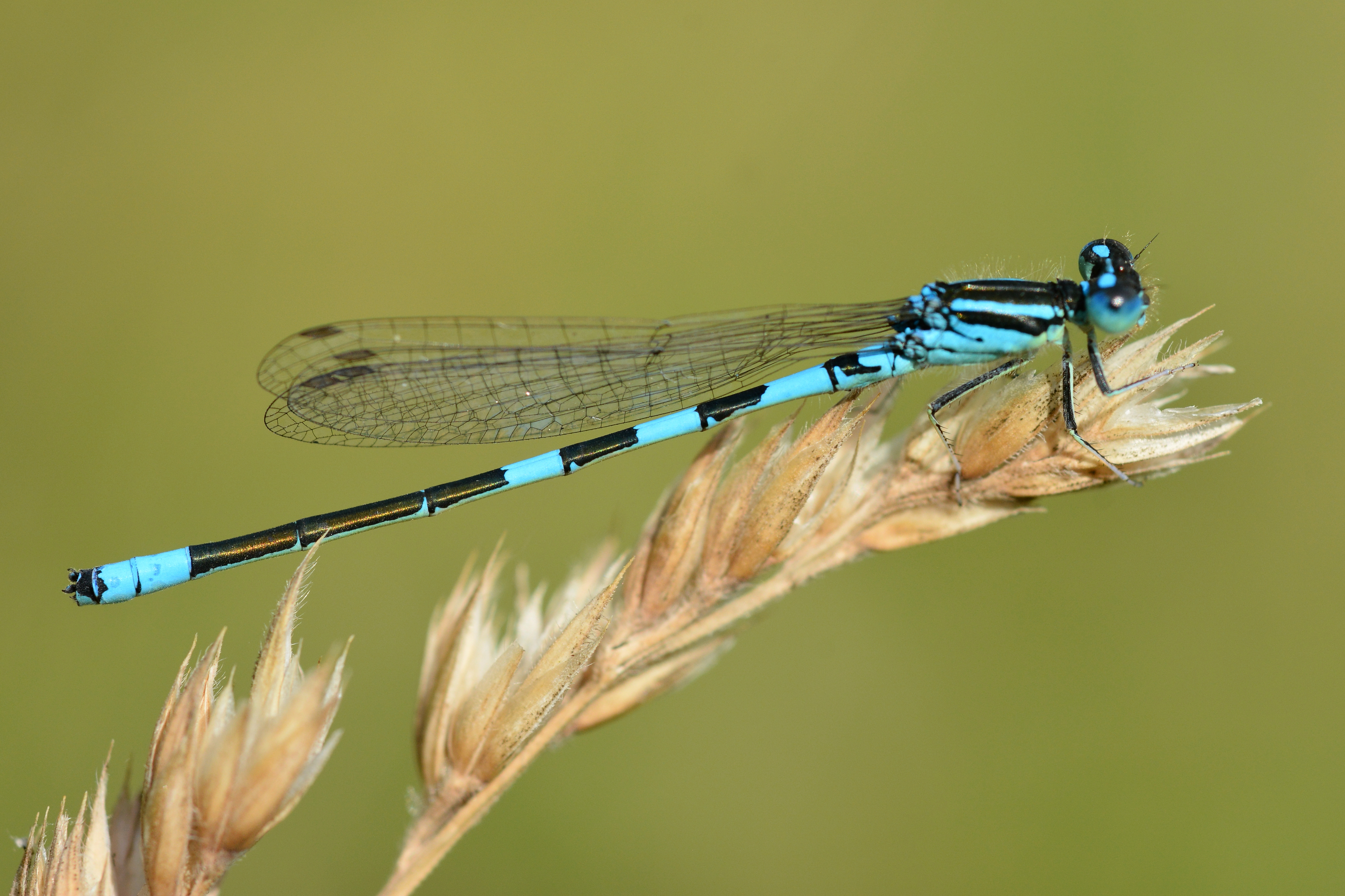 Coenagrion scitulum